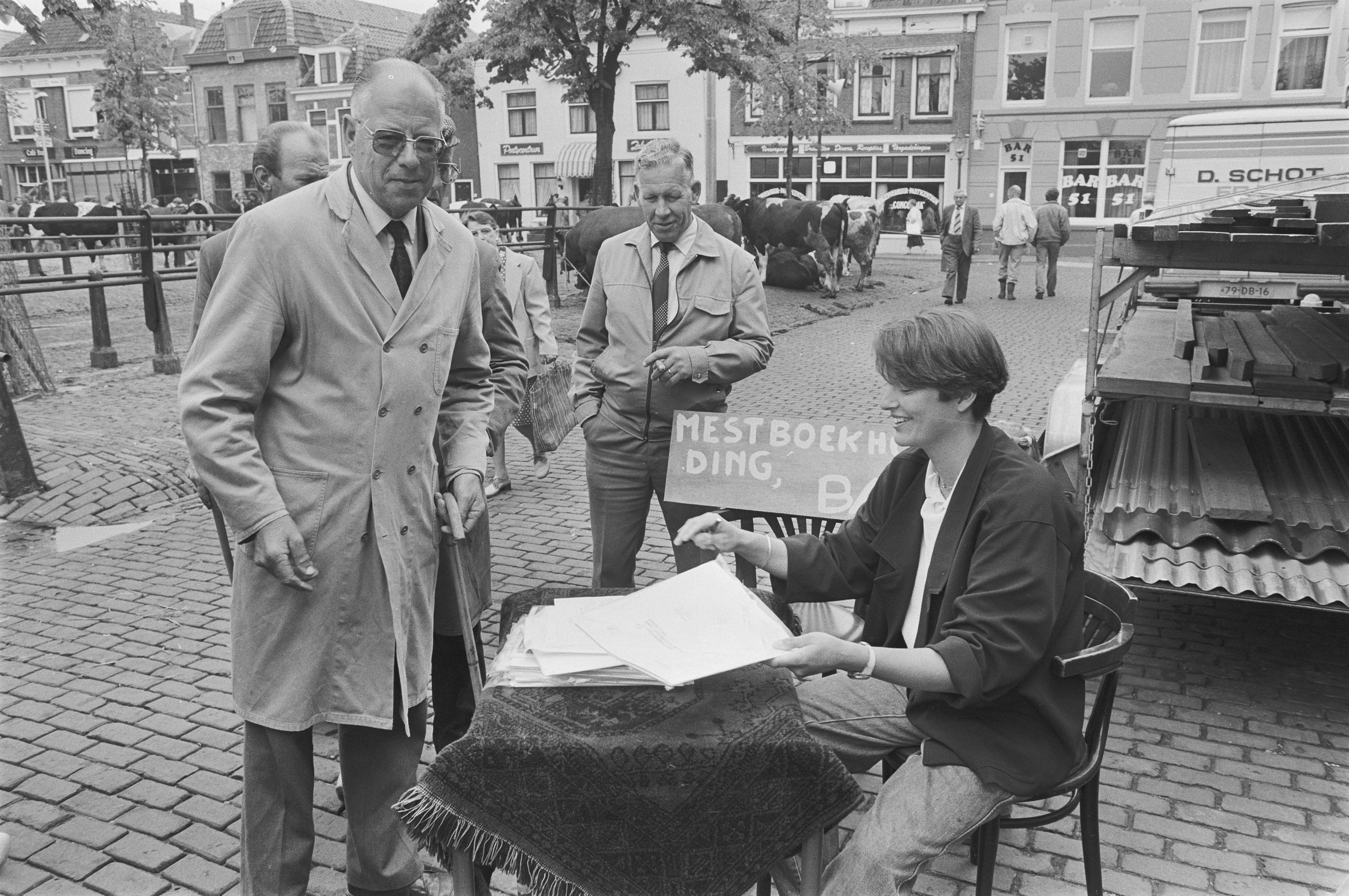 Collectie / Archief : Fotocollectie Anefo Reportage / Serie : [ onbekend ] Beschrijving : Boeren leveren uit protest mestboekhouding blanco in op Koemarkt in Purmerend Datum : 2 juni 1987 Locatie : Purmerend Trefwoorden : BOEREN, protesten Fotograaf : Gerrits, Roland / Anefo Auteursrechthebbende : Nationaal Archief Materiaalsoort : Negatief (zwart/wit) Nummer archiefinventaris : bekijk toegang 2.24.01.05 Bestanddeelnummer : 933-9988